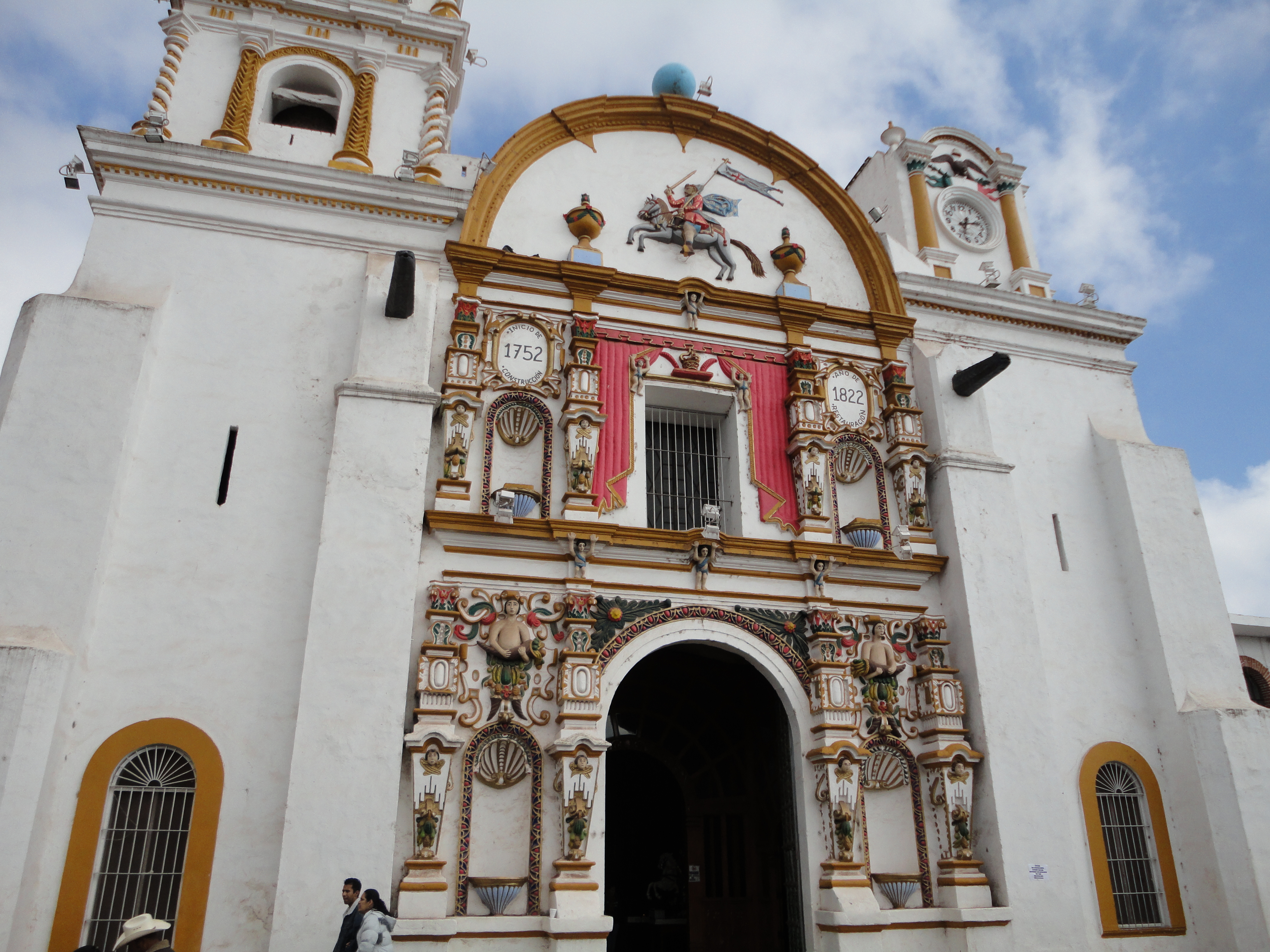 Parroquia de Santiago Apóstol